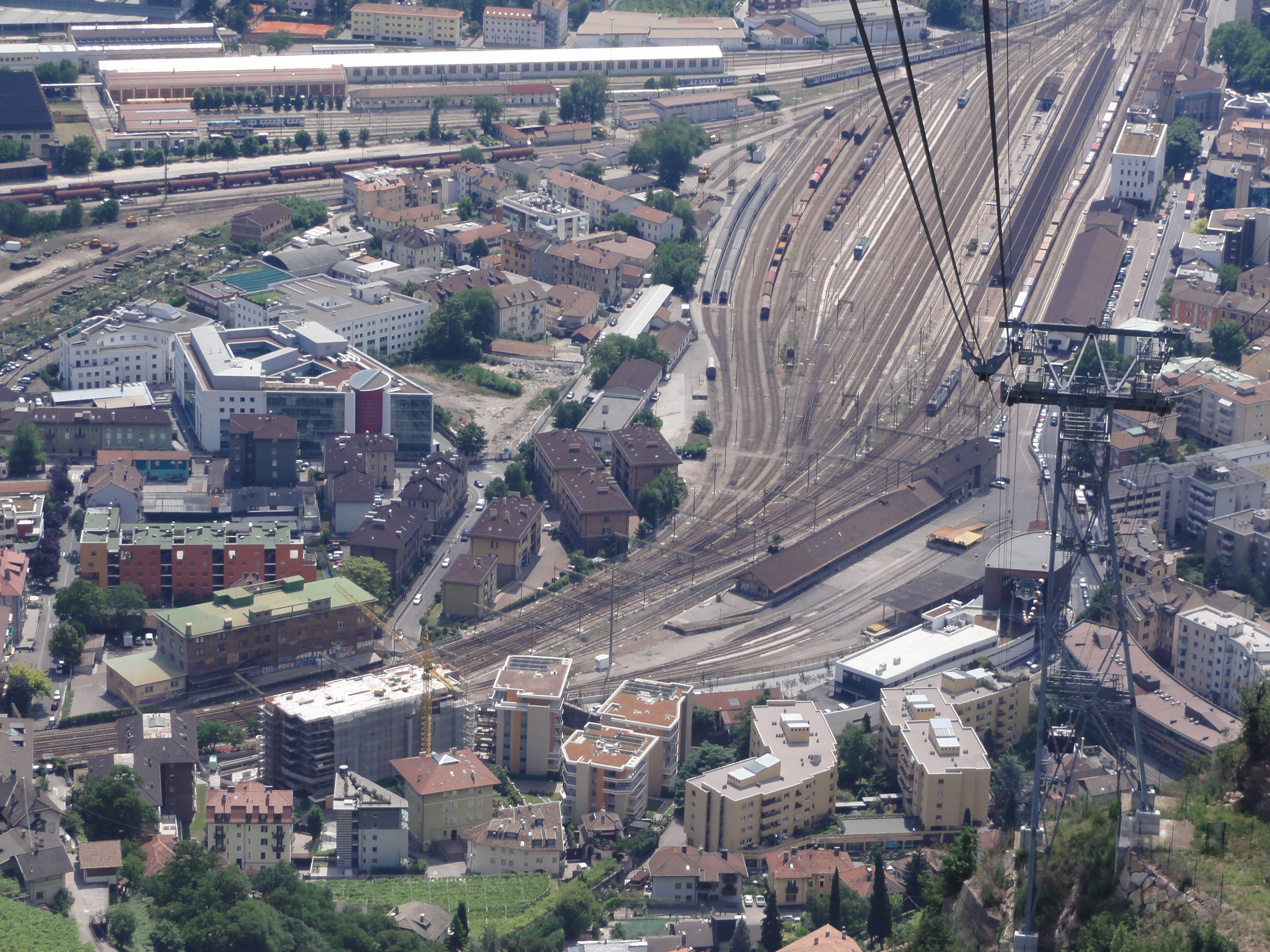 Bozen-Bolzano — Blick auf den Hauptbahnhof